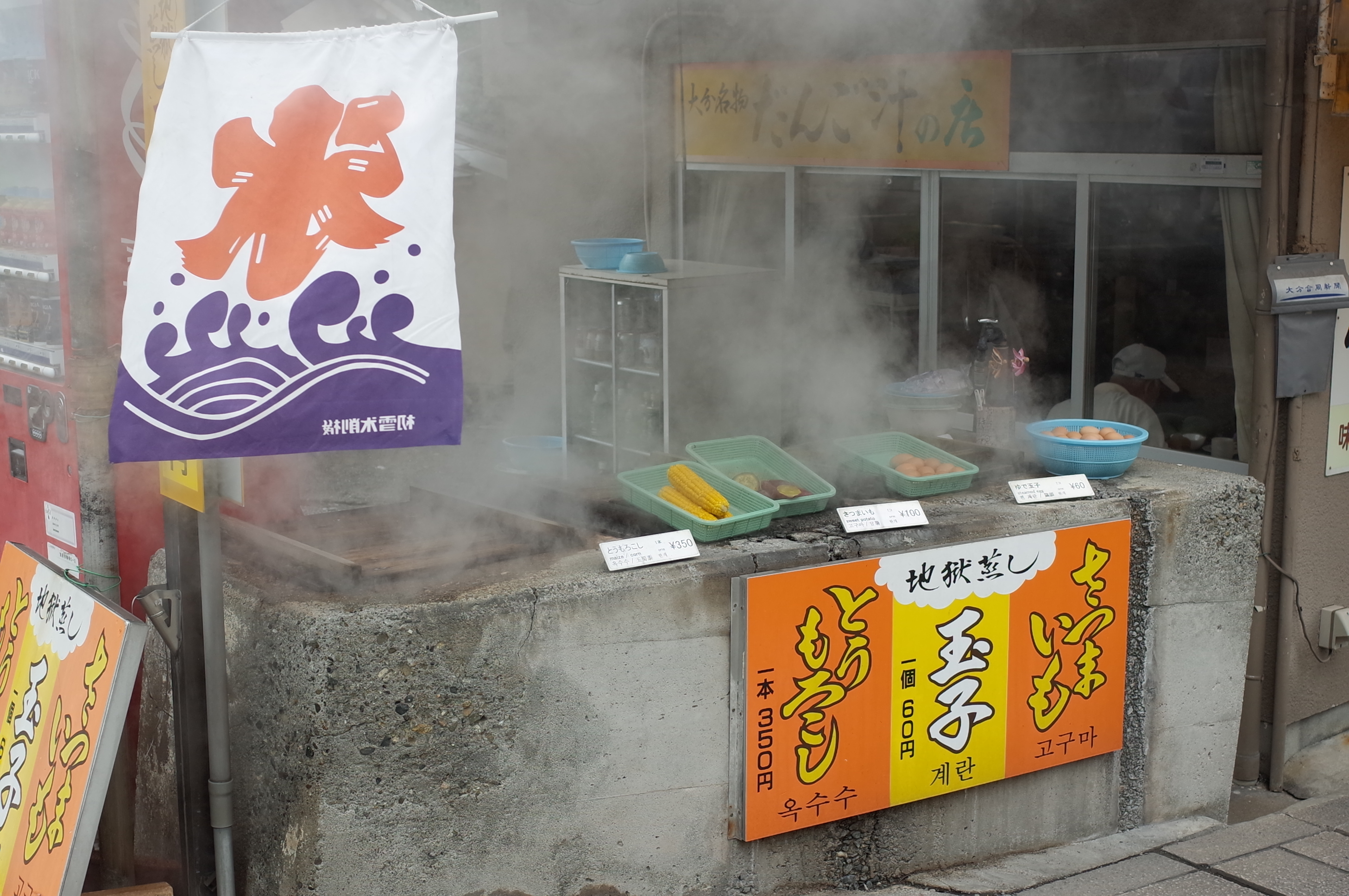 別府 地獄めぐり